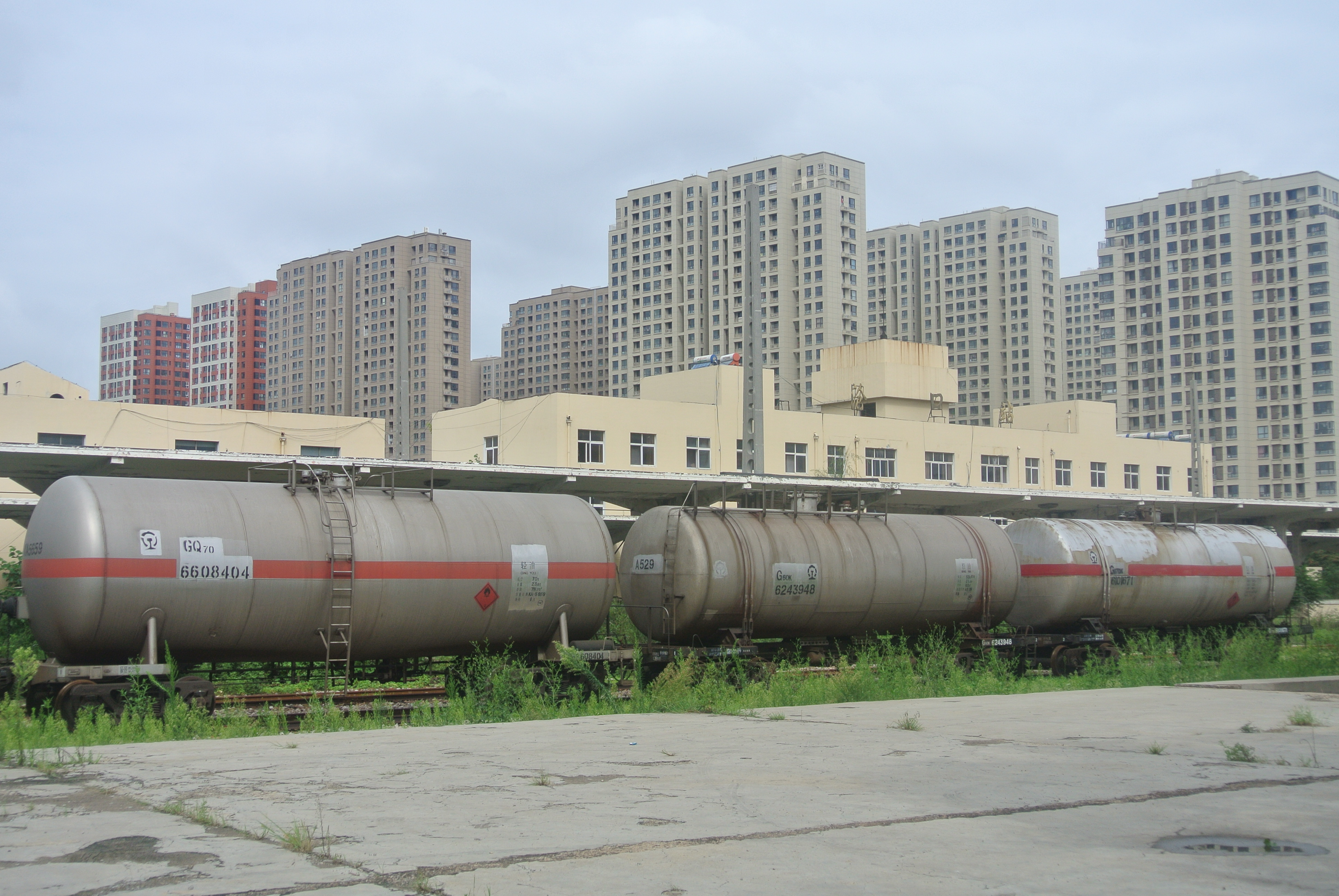 青岛沧口火车站